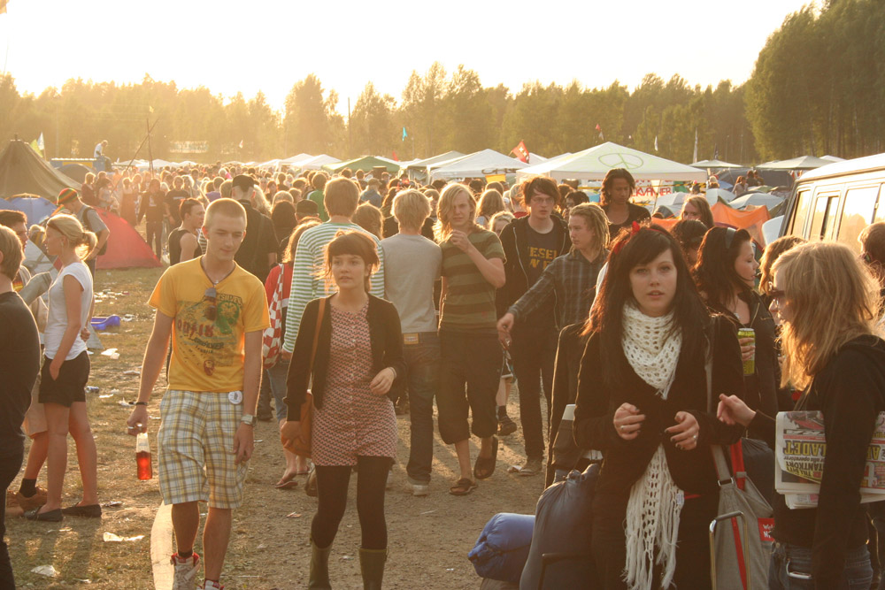 Campingområdet, Arvikafestivalen 2006.